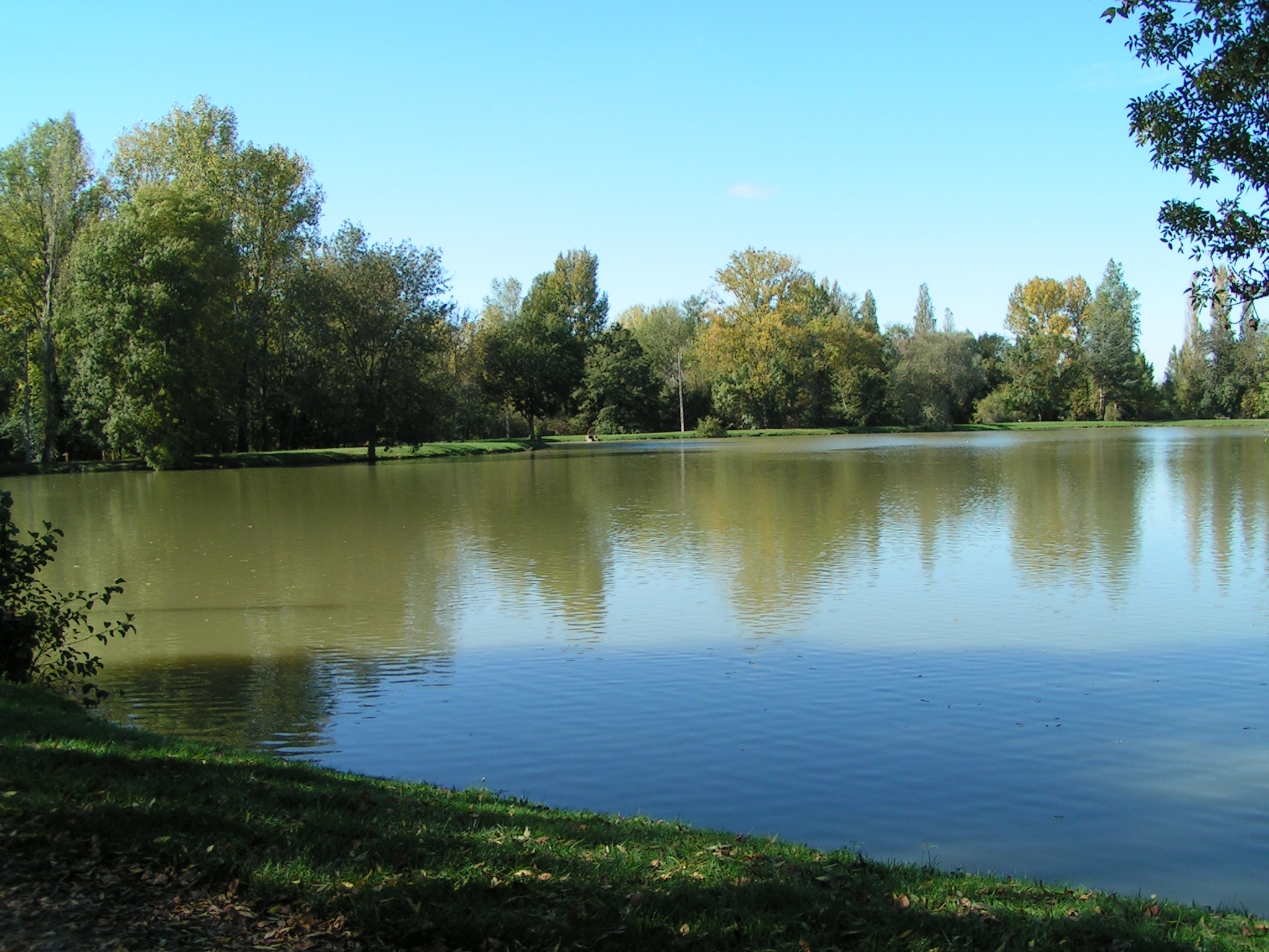 Petit lac de Peyssies Catégorie: Image GFDL